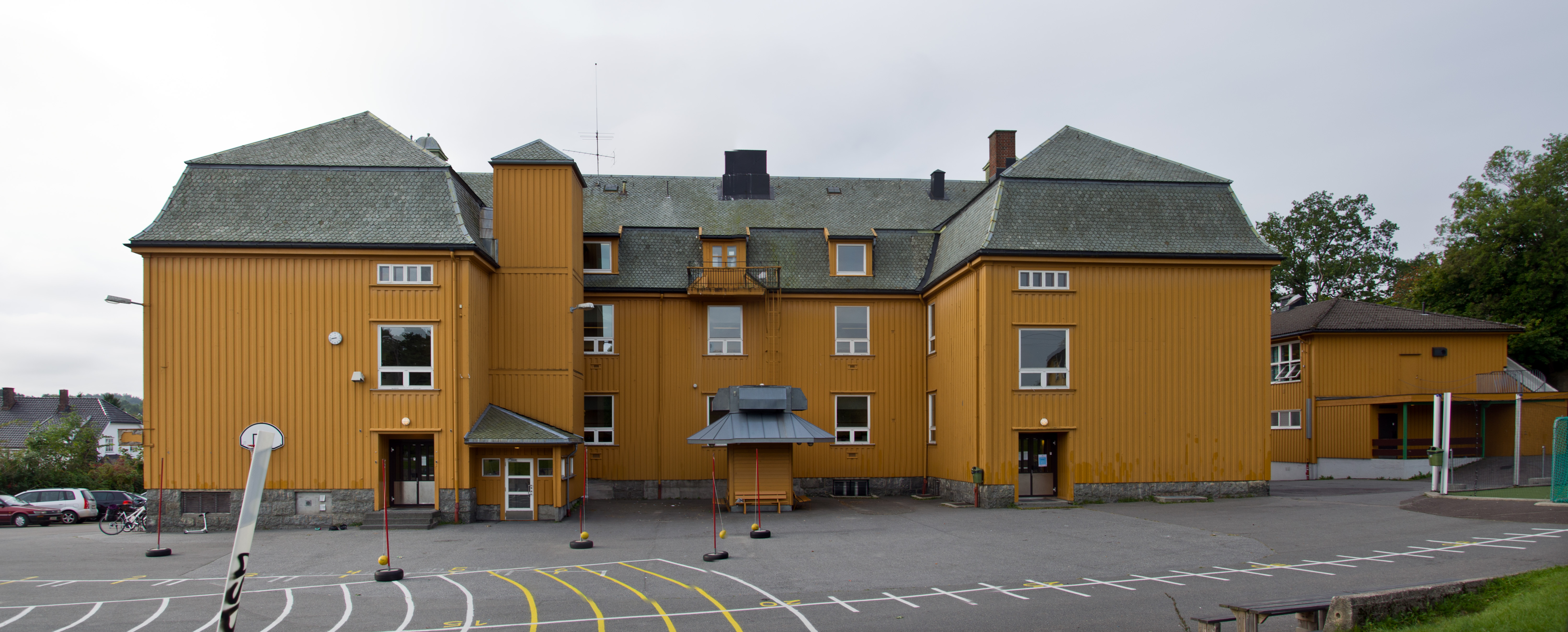 Sande skole i Sandefjord